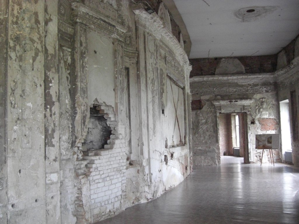 Чесменская галерея Большого Гатчинского дворца. 2008 год.